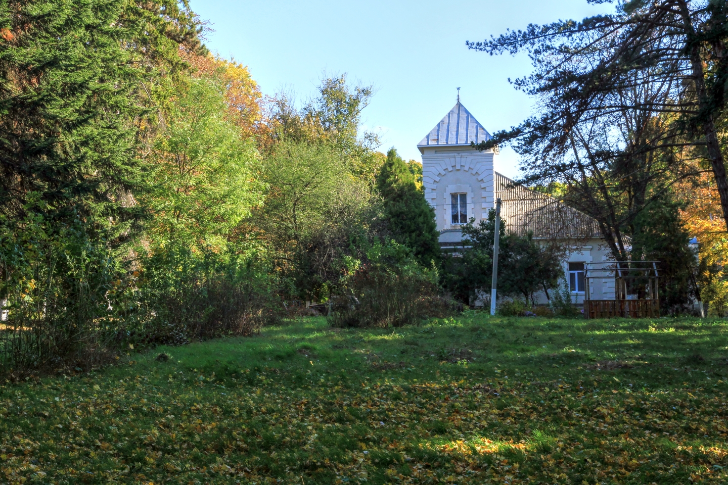 Павловский парк, монумент природы, находится в Бриченский район, с. Павловка (код MD-BR-map-002)